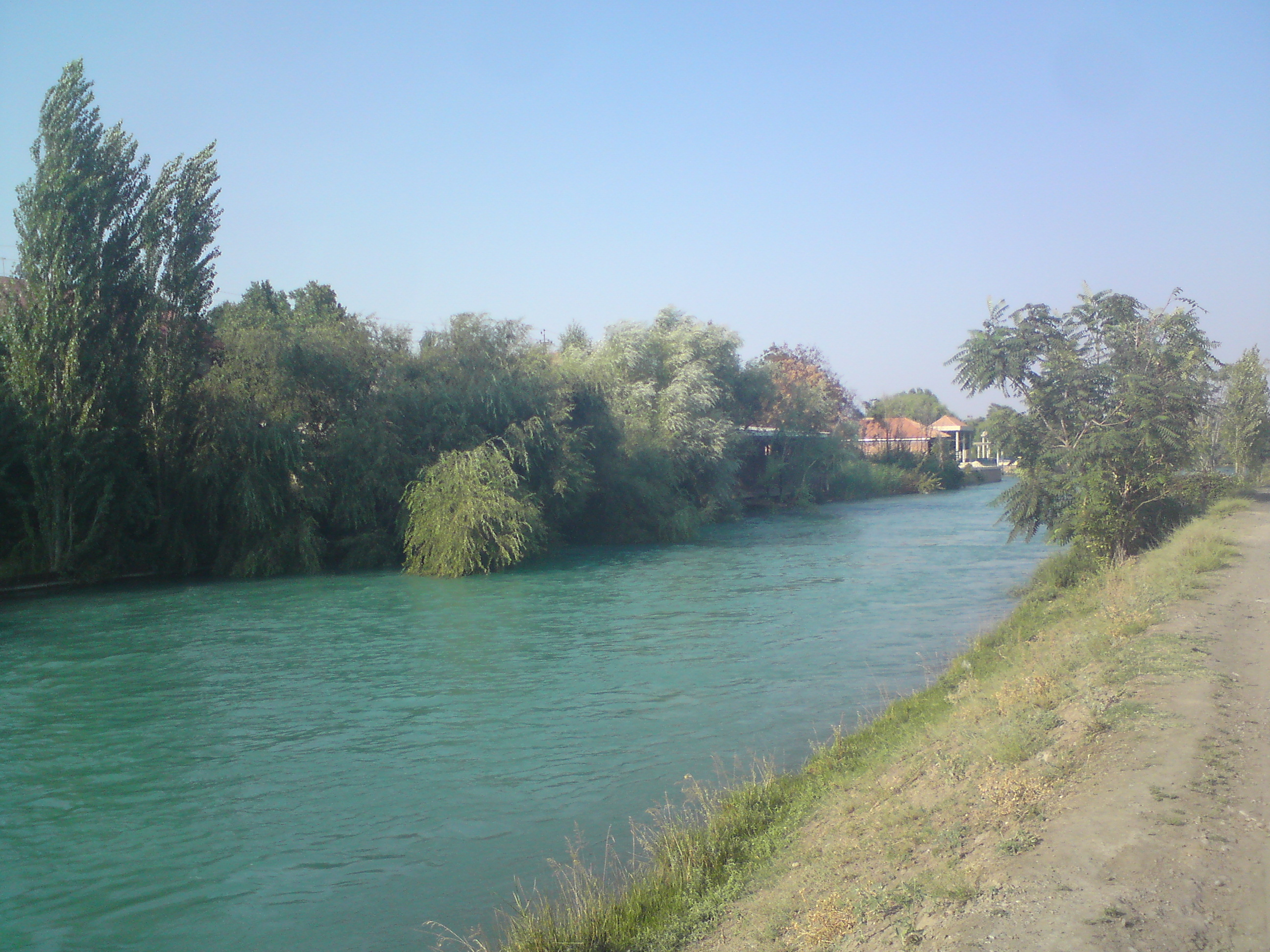 Канал Бозсу в городе Чирчик, Ташкентская область